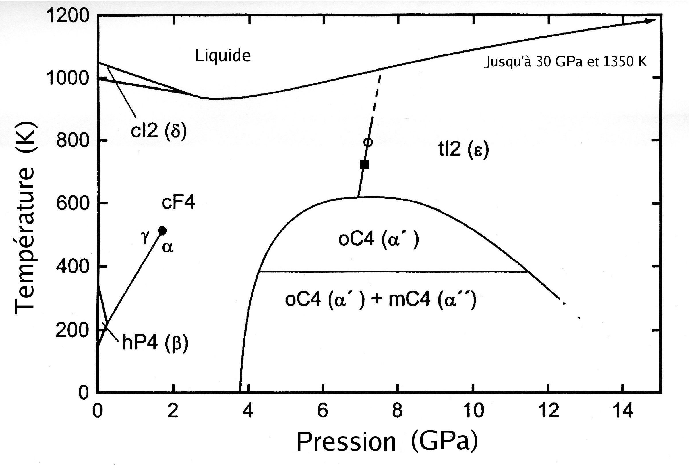 Diagramme de phase du cérium en francais